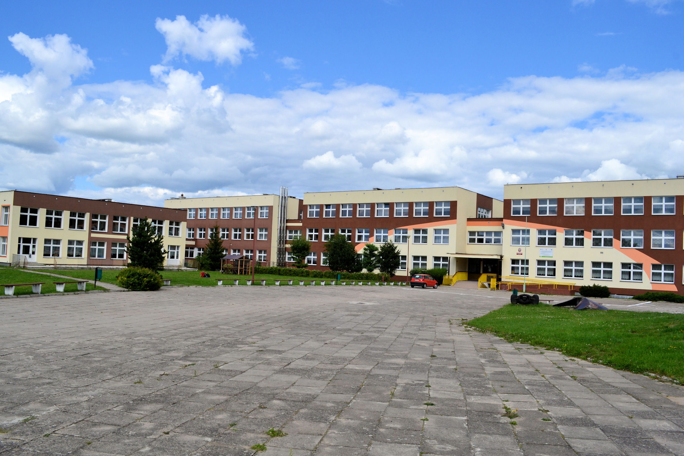 Czaplinek